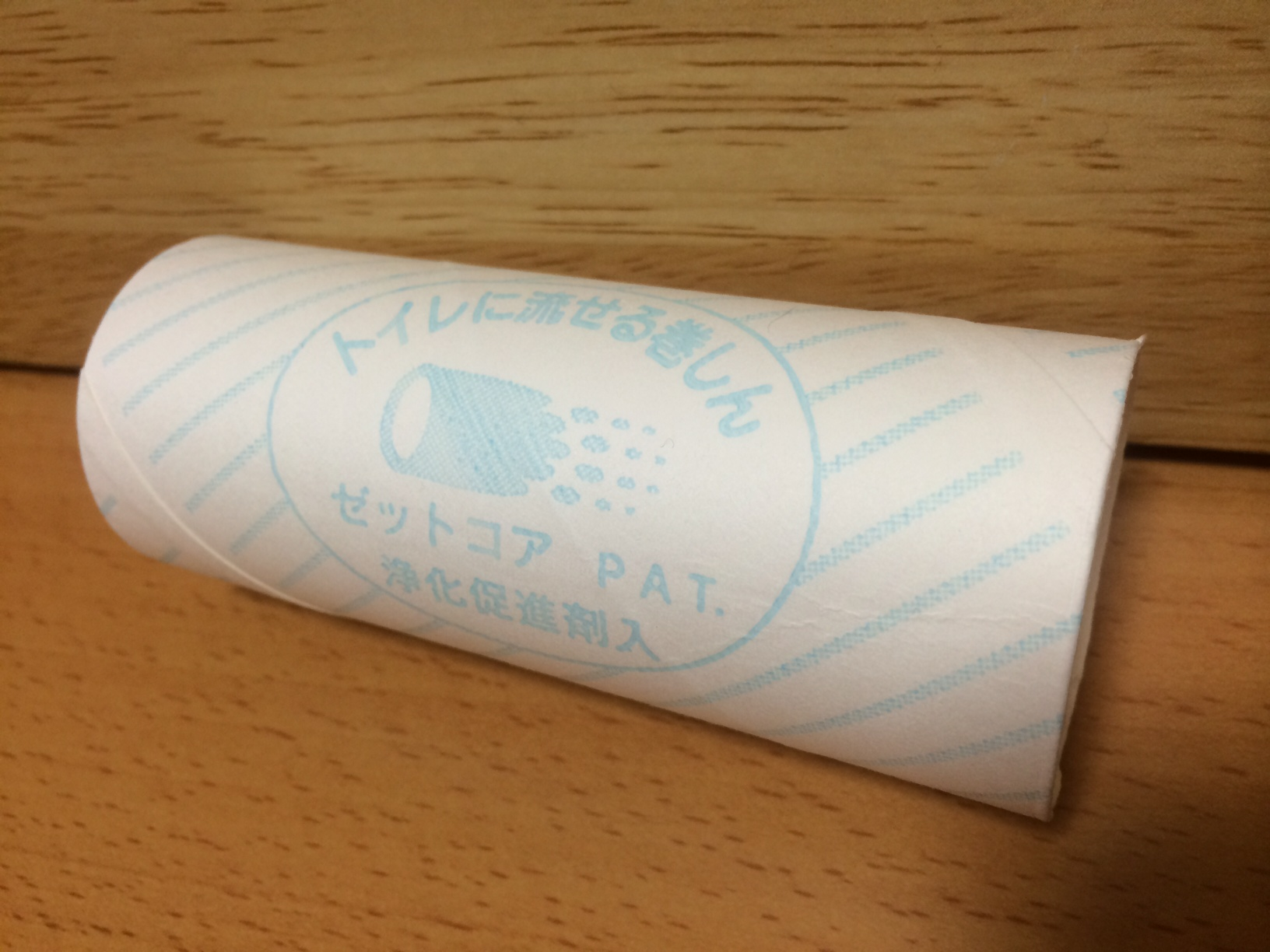 パルプテックス巻き芯1